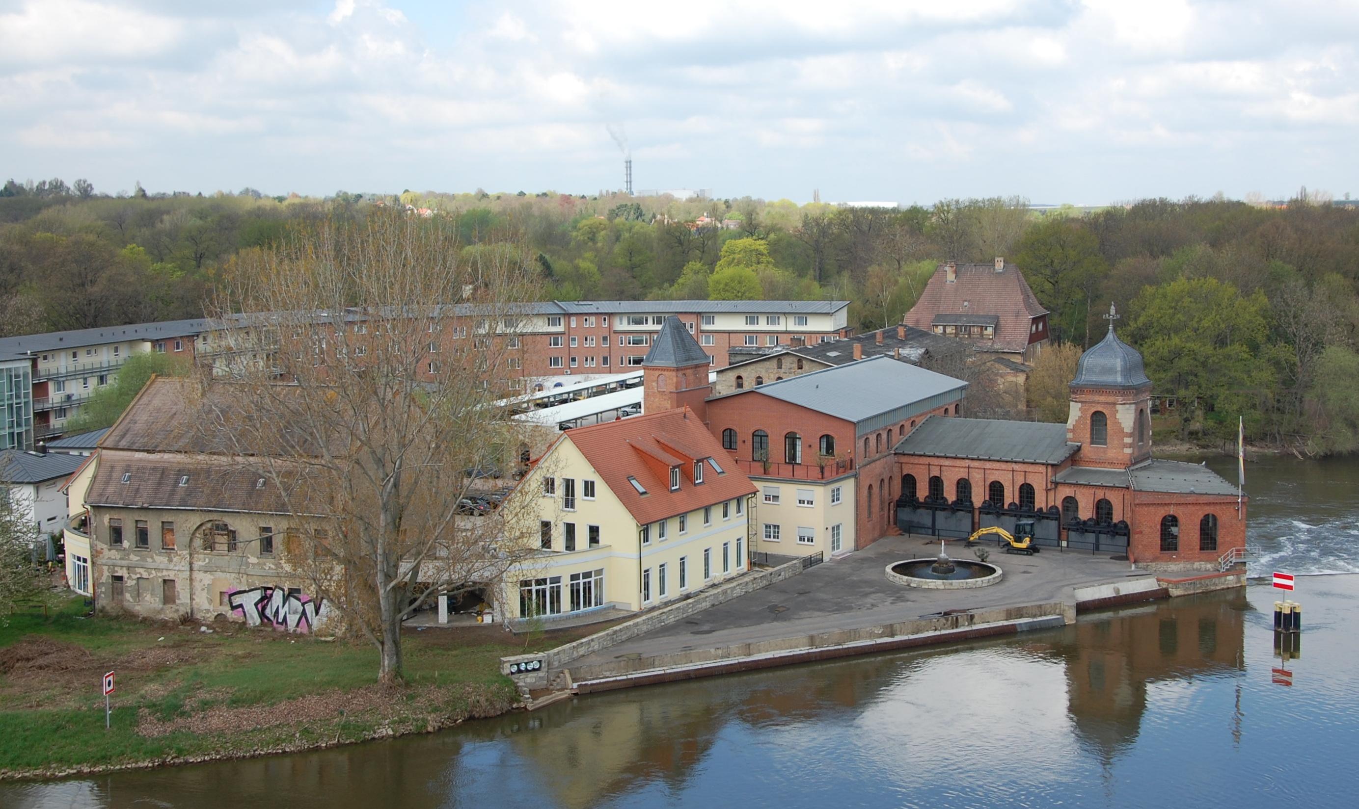 Saalemühle Bernburg